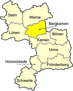 Germany Bergkamen Lage im Kreis Unna